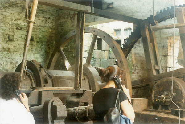 Maquinária movido a água no antigo Abbeydale Industrial Hamlet (antiga fábrica de talheres e ferramentas), Sheffield, Yorkshire, Inglaterra. foto: Wikityke